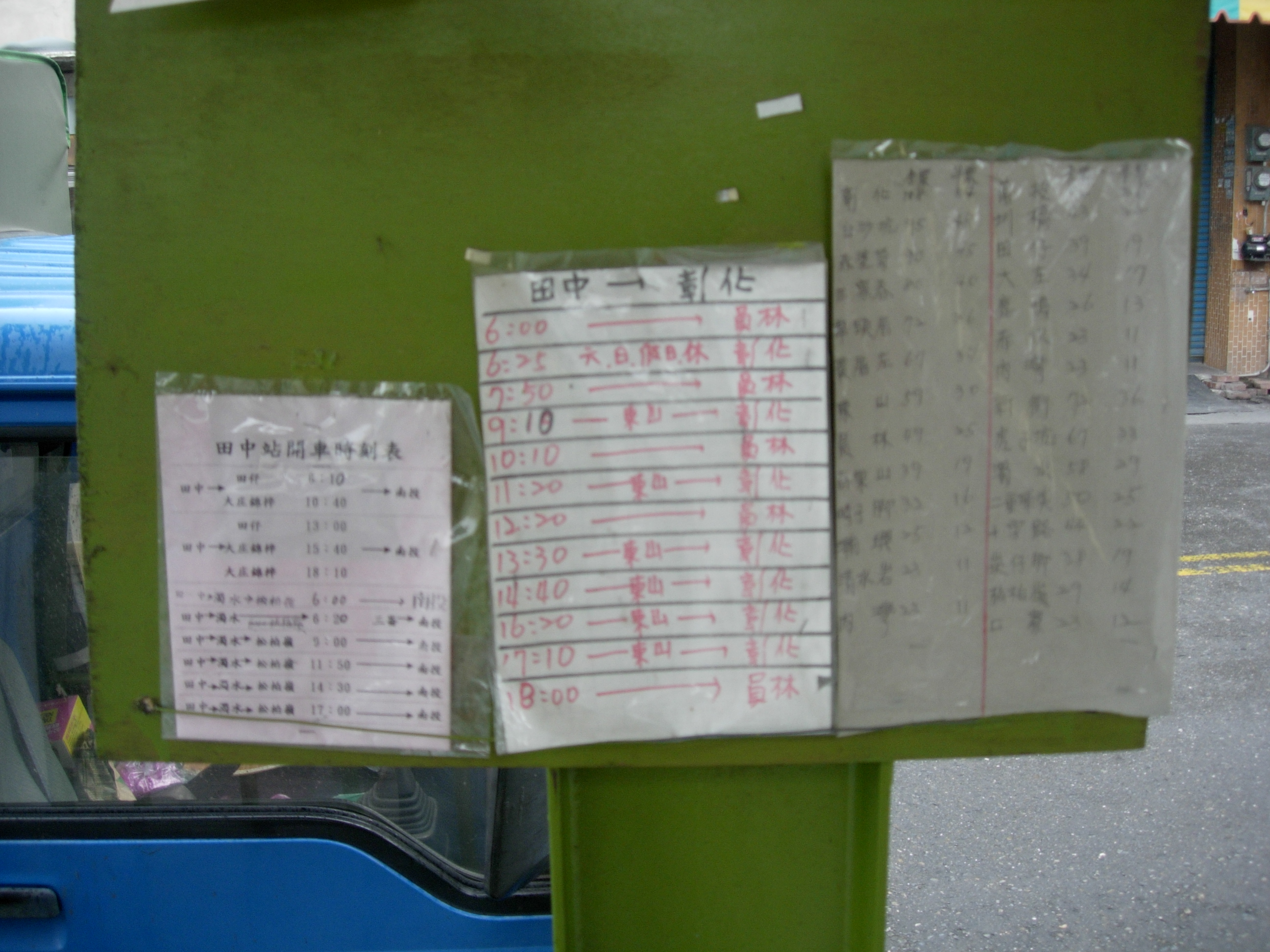 中文（台灣）: 彰化客運田中站時刻表